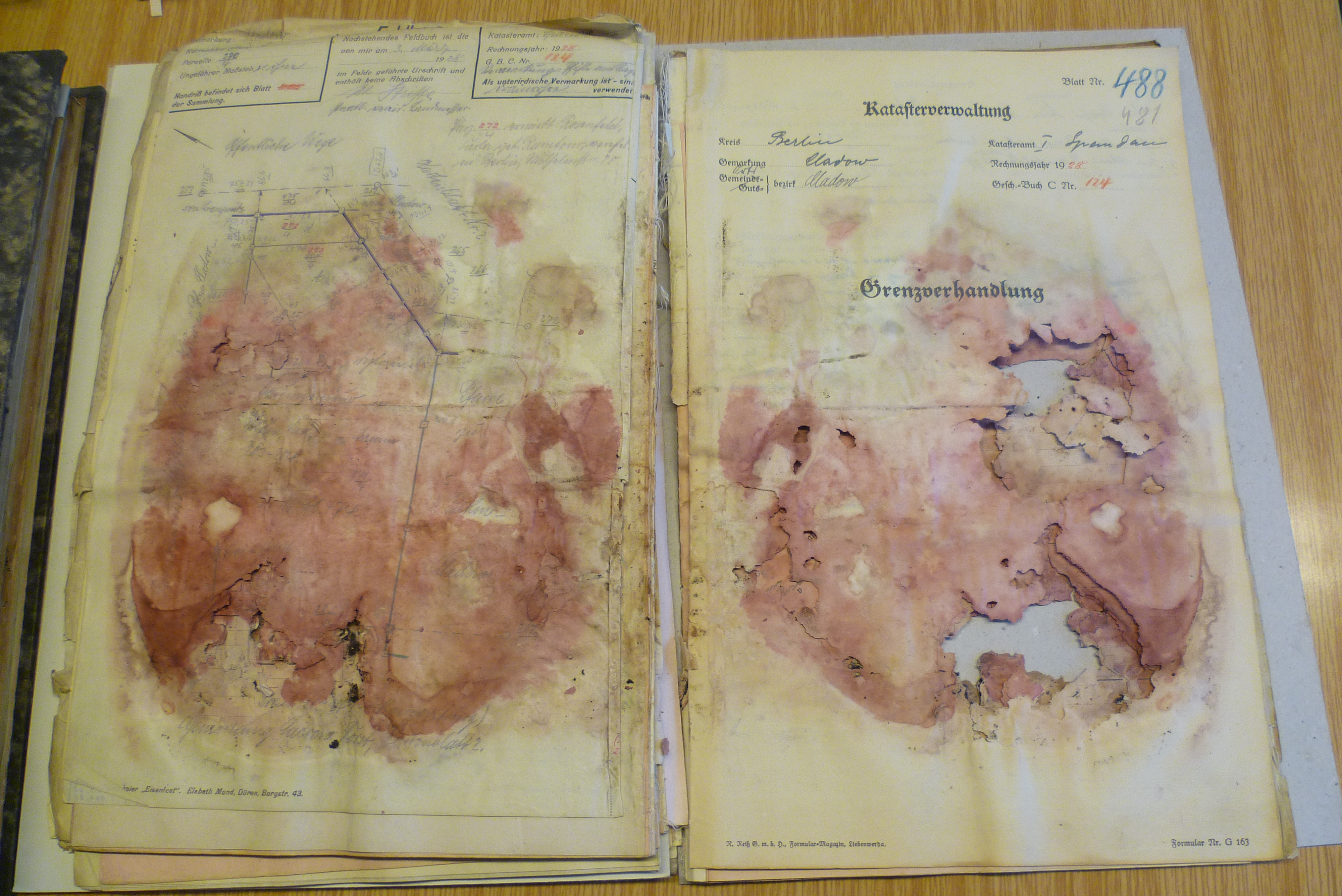 Schimmelschaden in historischer Akte